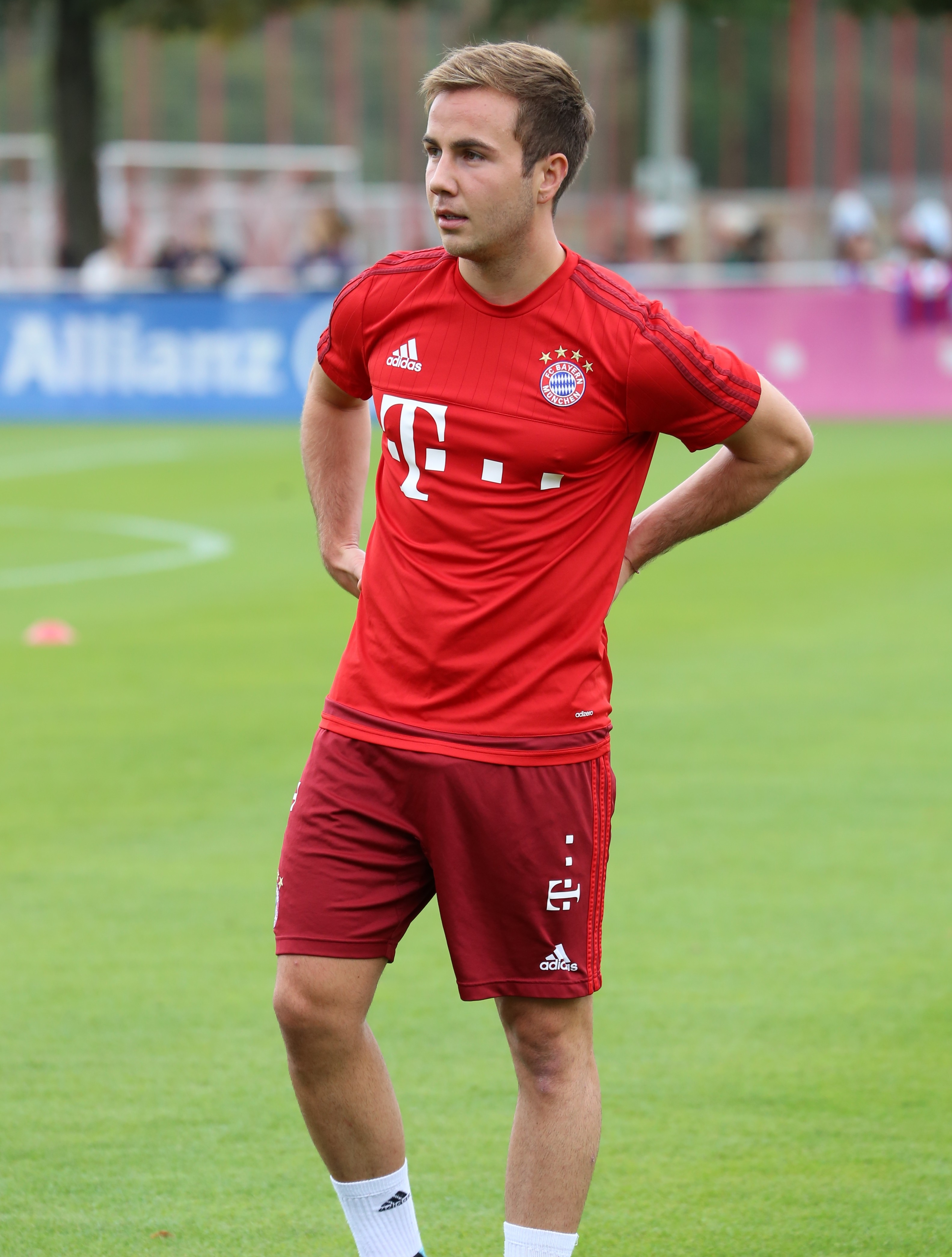 Mario Götze beim Training auf dem Gelände des FC Bayern München